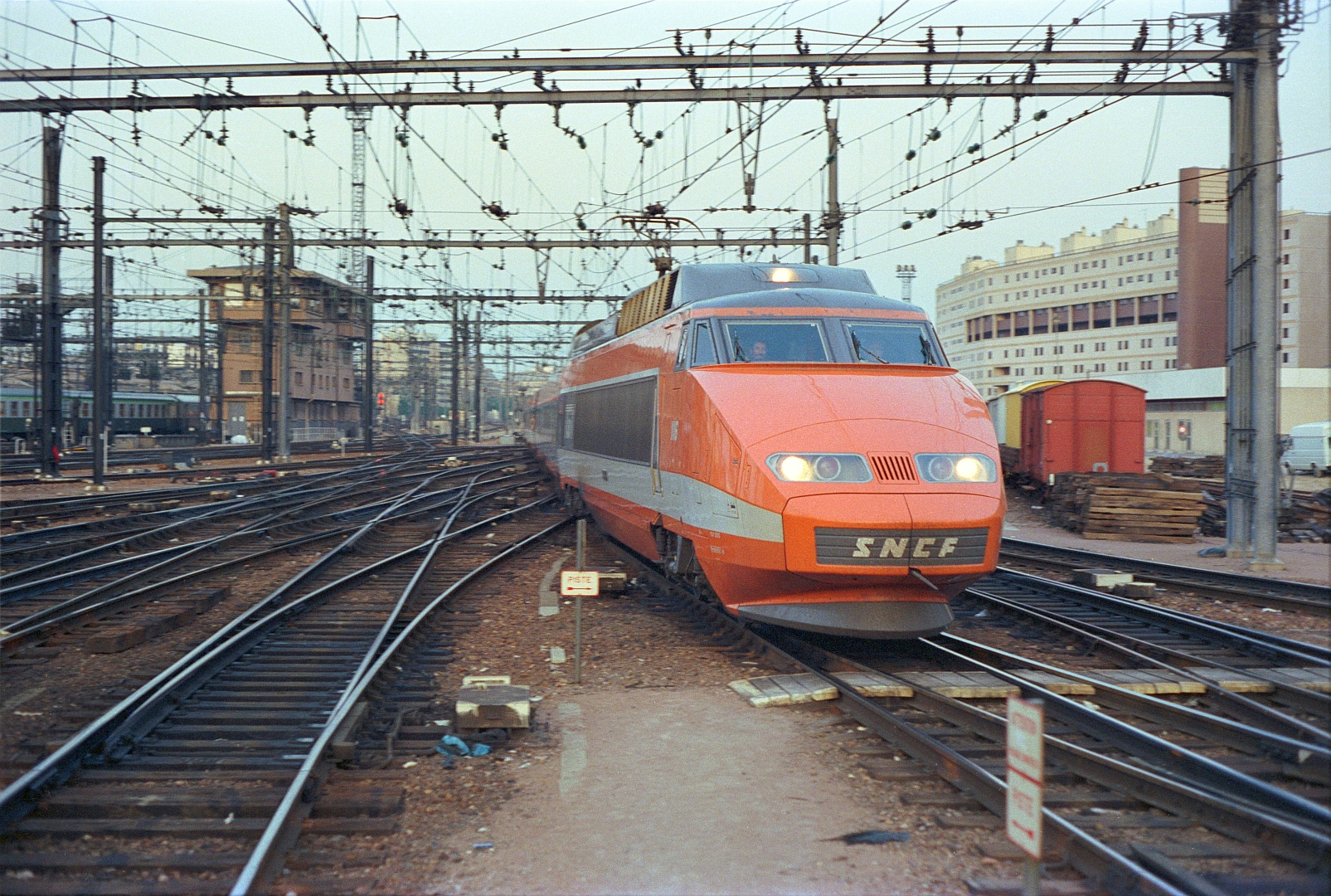 Rame TGV Sud-Est en version d'origine orange, en gare de Paris-Lyon.